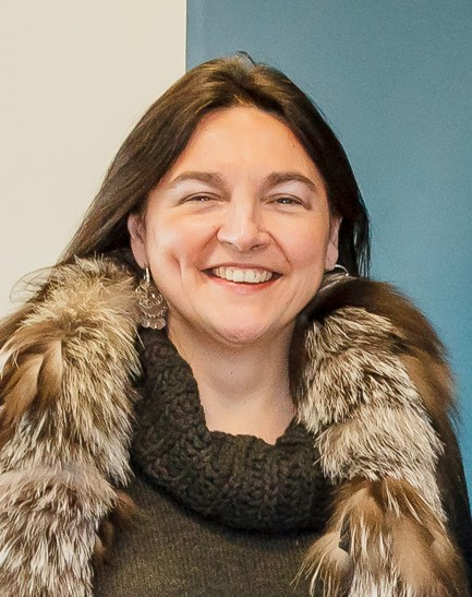 Marie-Christine Marghem, le 27 février 2015